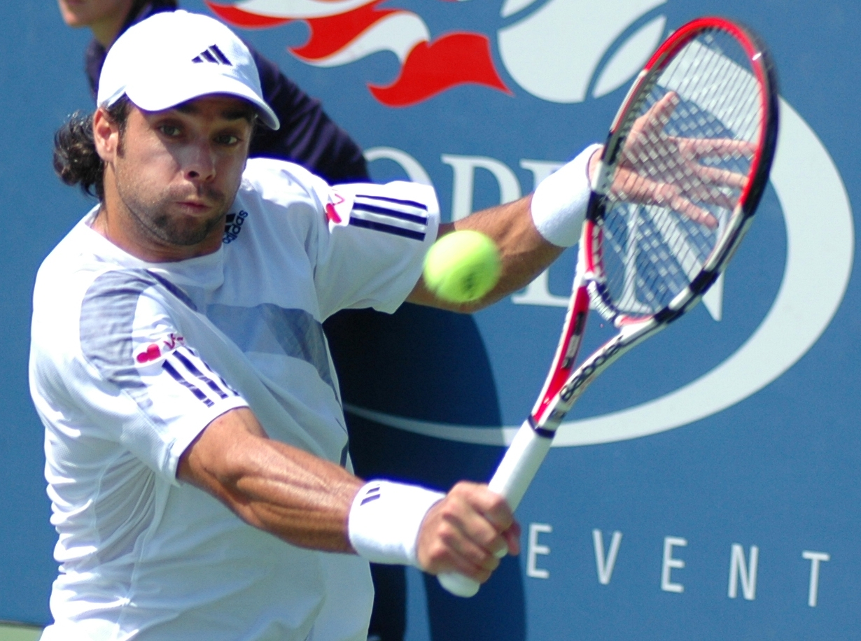 Fernando Gonzalez US Open 2009